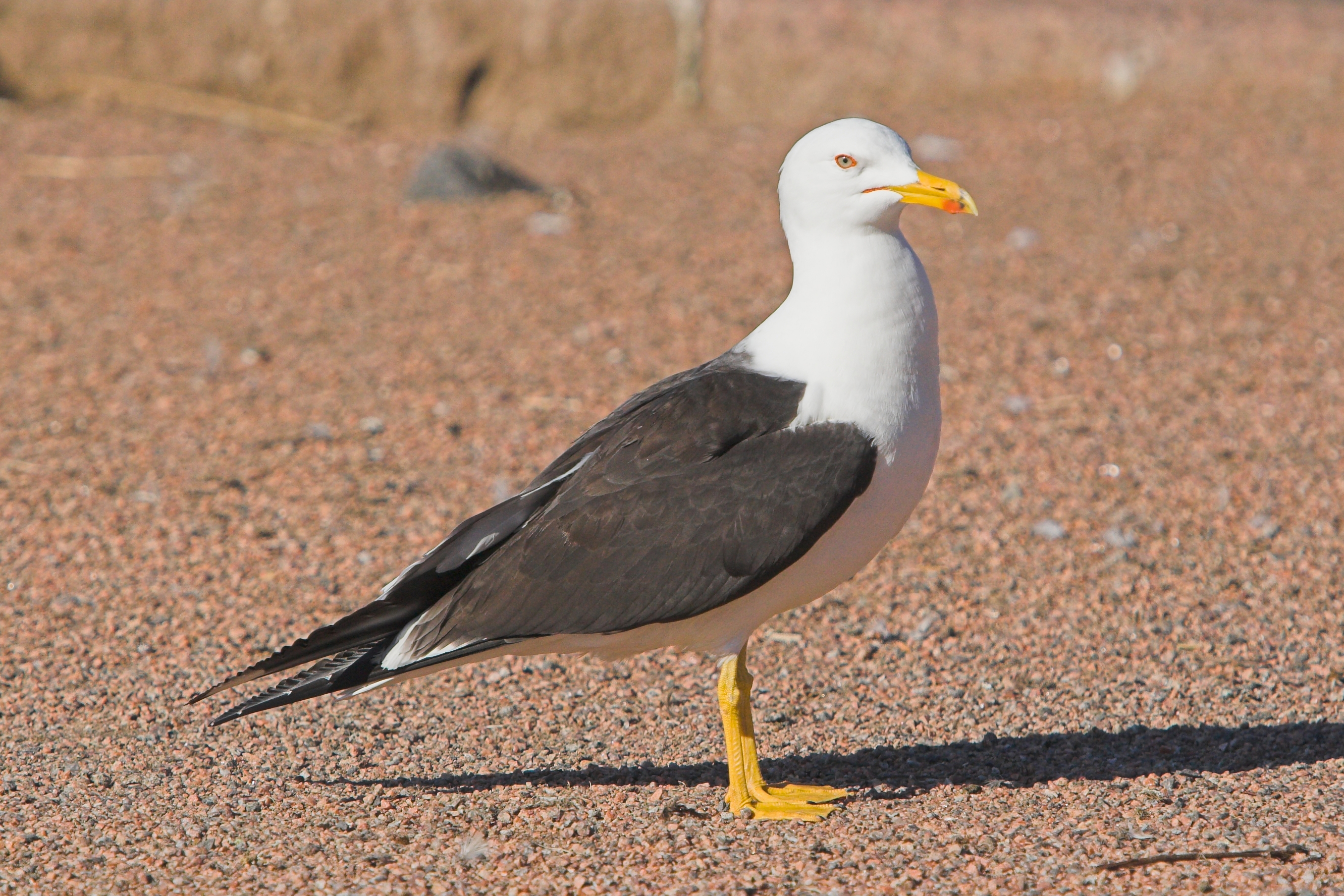 Larus fuscus, Finland